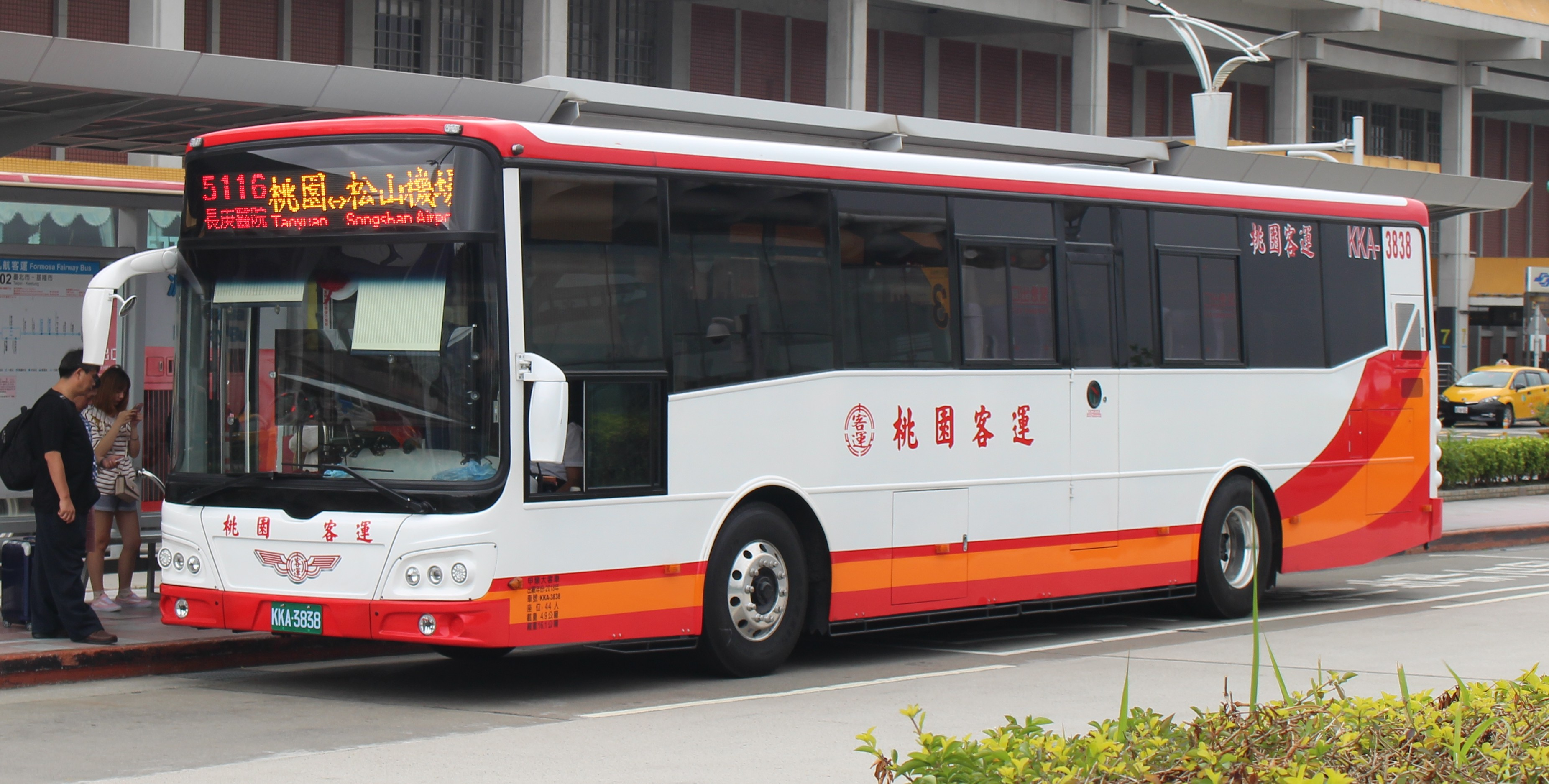 桃園客運 2018 Fuso RM11FN2XE KKA-3838 5116